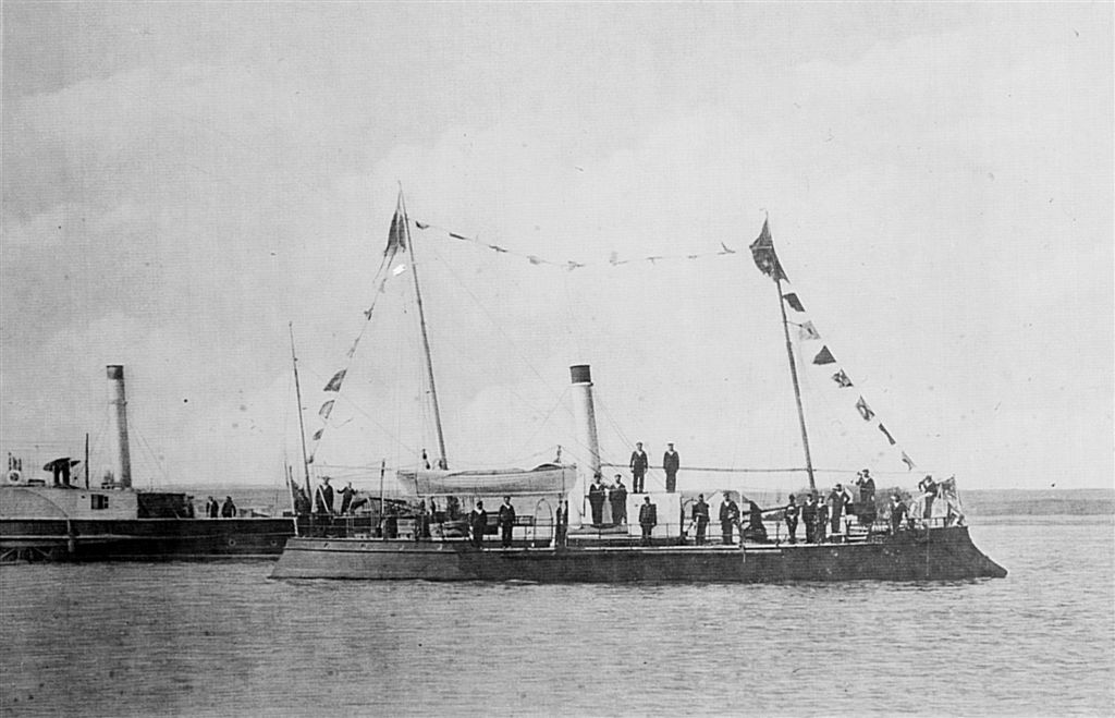 Canoniera românească "Fulgerul", construită în 1873 / Romanian cannon boat "Fulgerul", built in 1873. Another view with bowsprit removed.